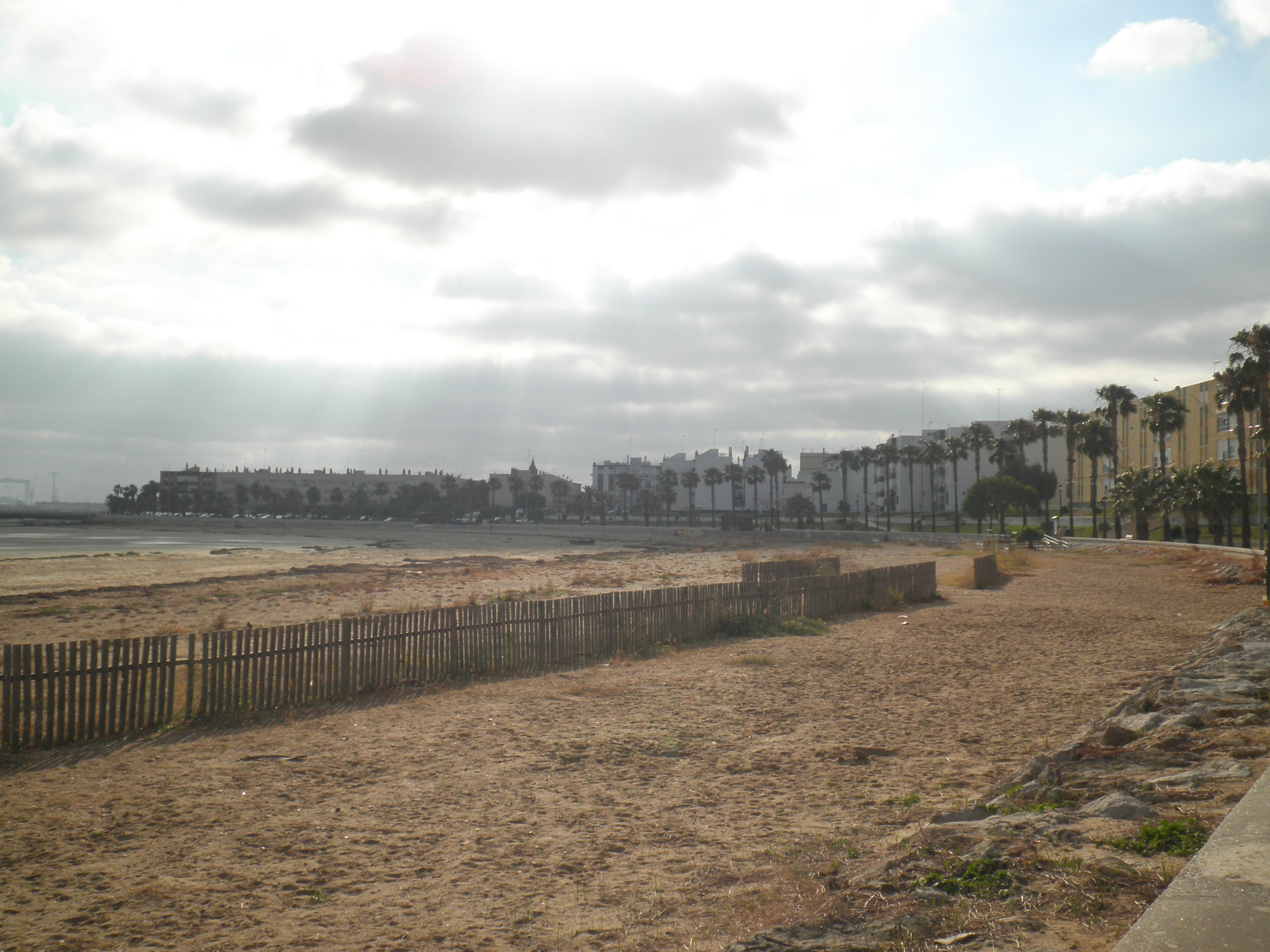 Vista de la Playa de la Cachucha con la marea vacía.